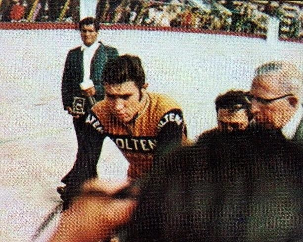 Eddy Merckx recordman de l'heure à Mexico (1972), 'Sprint 73', Panini figurina n°198.